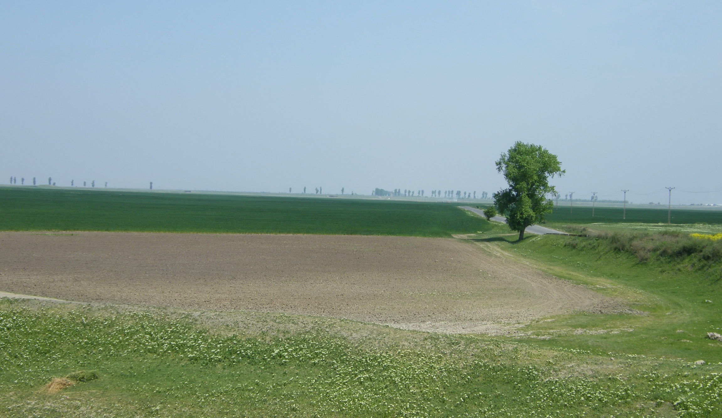 Valea râului Călmăţui la Lişcoteanca comuna Bordei Verde Restricţii - fără restricţii